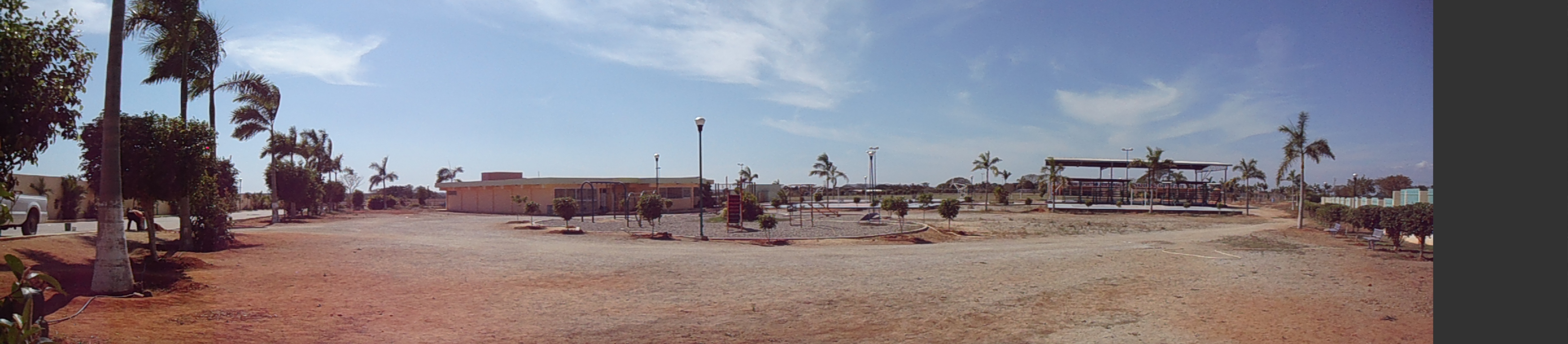 unidad deportiva de cuajinicuilapa